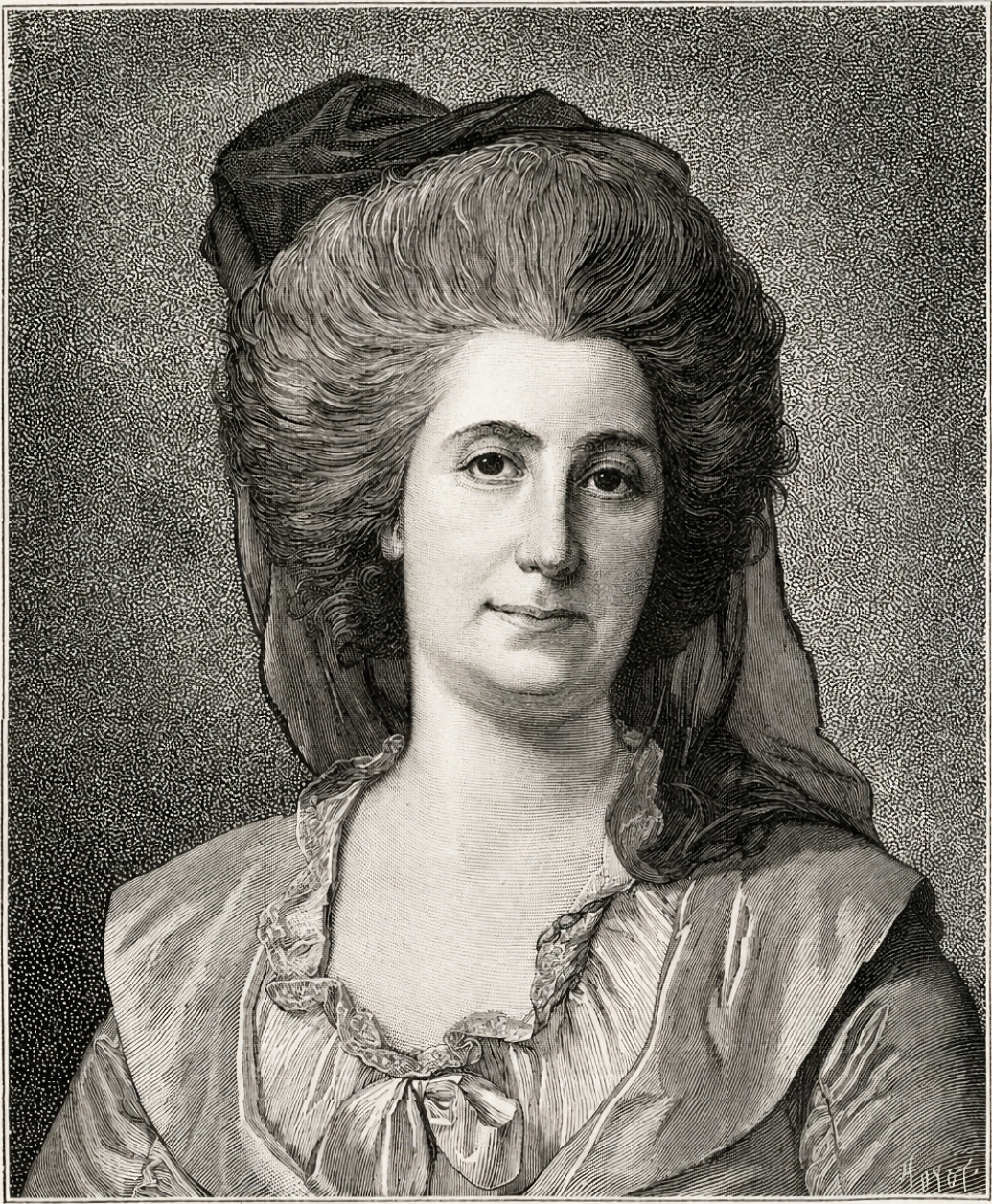 Portrait of Anne-Catherine de Ligniville, Madame Helvétius (1722-1800)